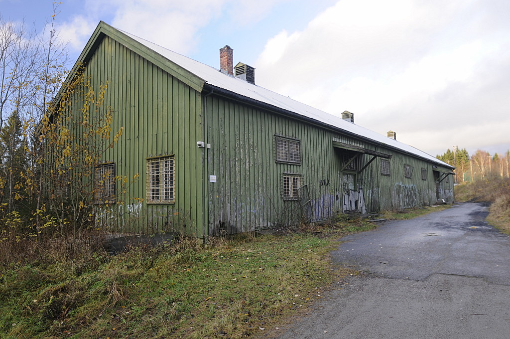 Restene av Magasinleiren på Jessheim